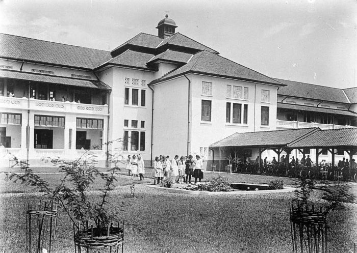 Repronegatief. De meisjesspeelplaats van de H.B.S. te Bandung, Java